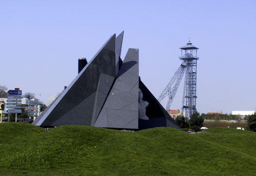 Monument commémorant la catastrophe de Lievin du 27 décembre 1974.